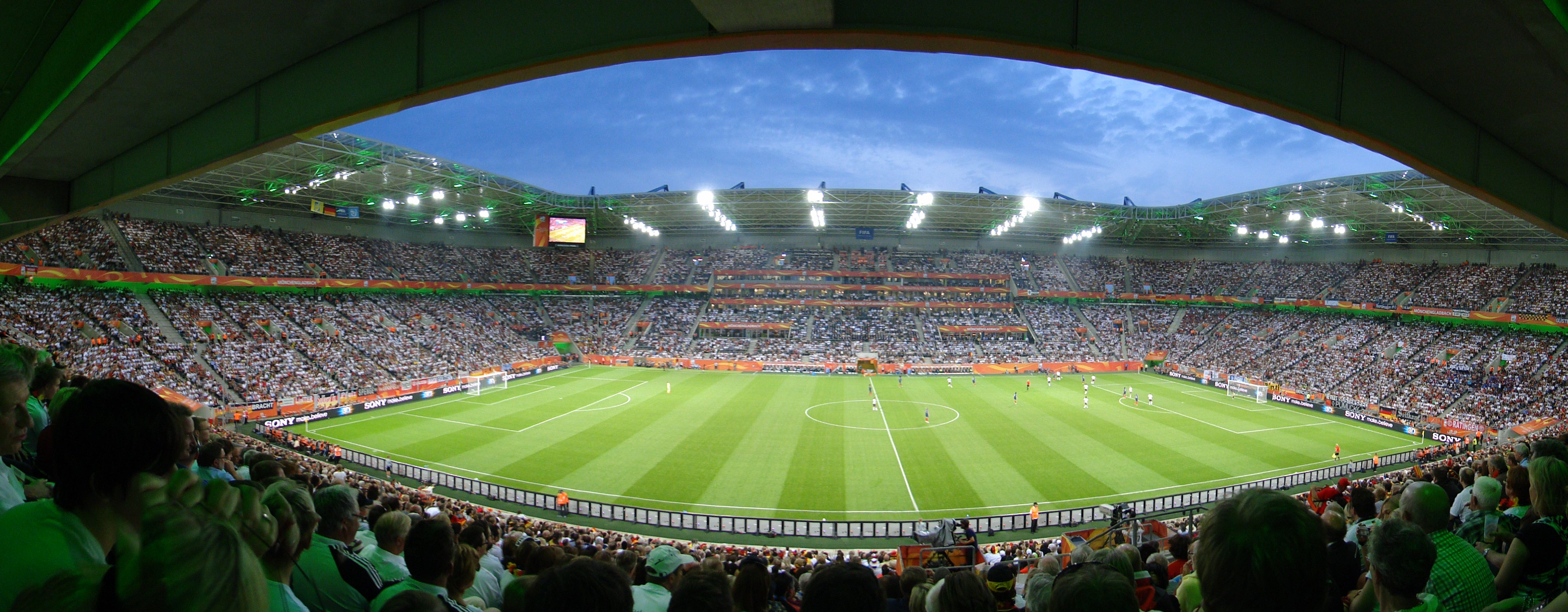 Panorama des Borussia-Park